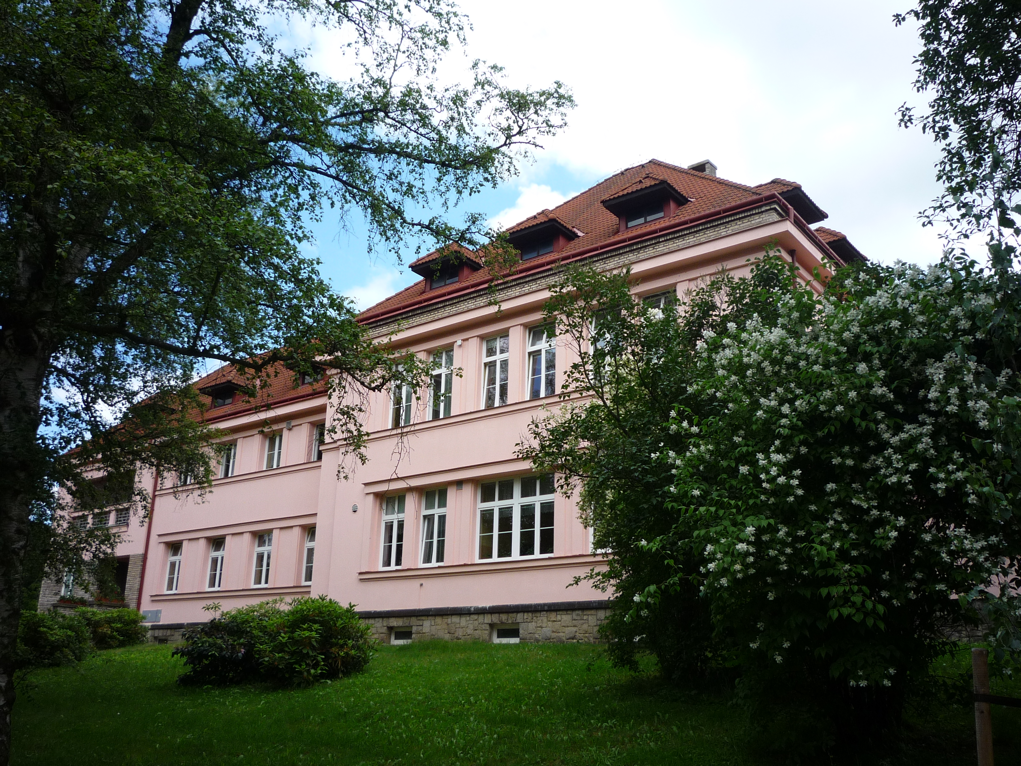 Autor fotografie Jiří Zelenka. Oddělení - pavilon č. 14. Psychiatrická nemocnice Havlíčkův Brod je odborný léčebný ústav psychiatrický a státní příspěvková organizace se sídlem v Havlíčkově Brodě v ulici Rozkošská. Perknov část města Havlíčkův Brod. Kraj Vysočina. Czech Republik.